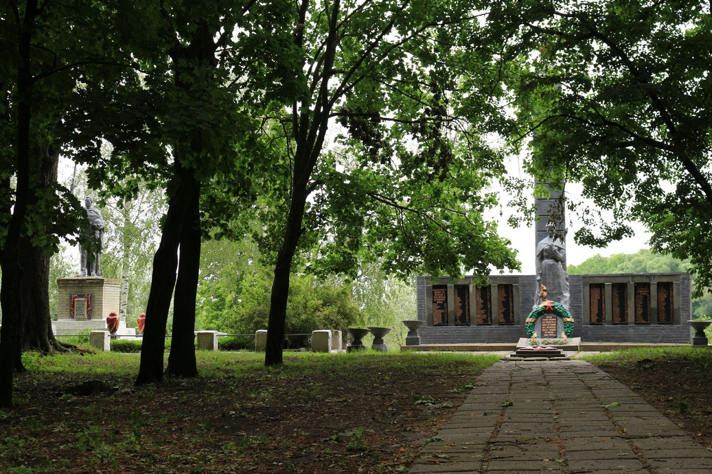 Меморіал в с. Комиші загиблим односельчанам та бійцям Радянської армії,які загинули в боях за село